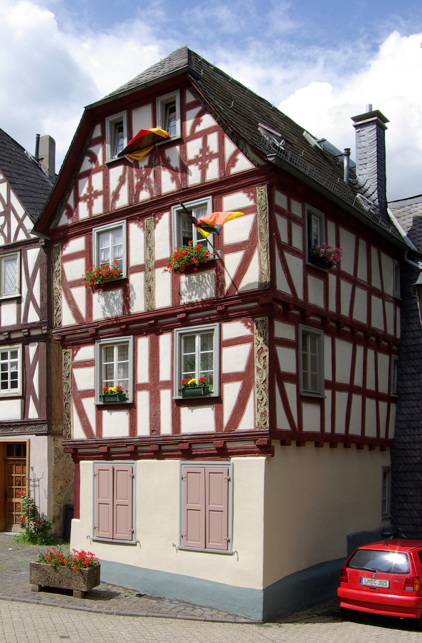 Limburg an der Lahn, Brückengasse 11, 1567